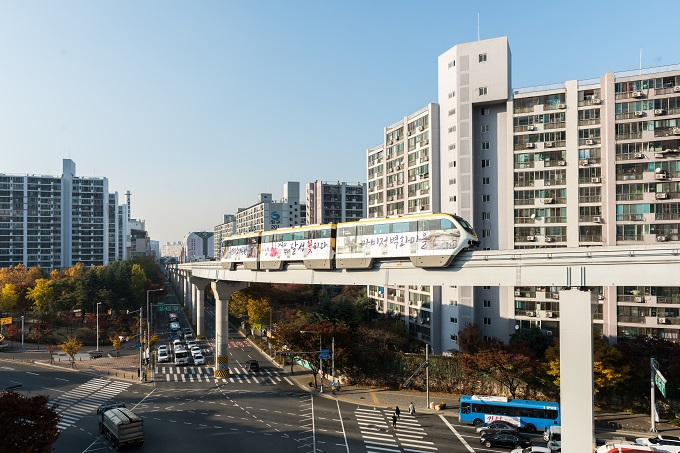 대구시 범물지구